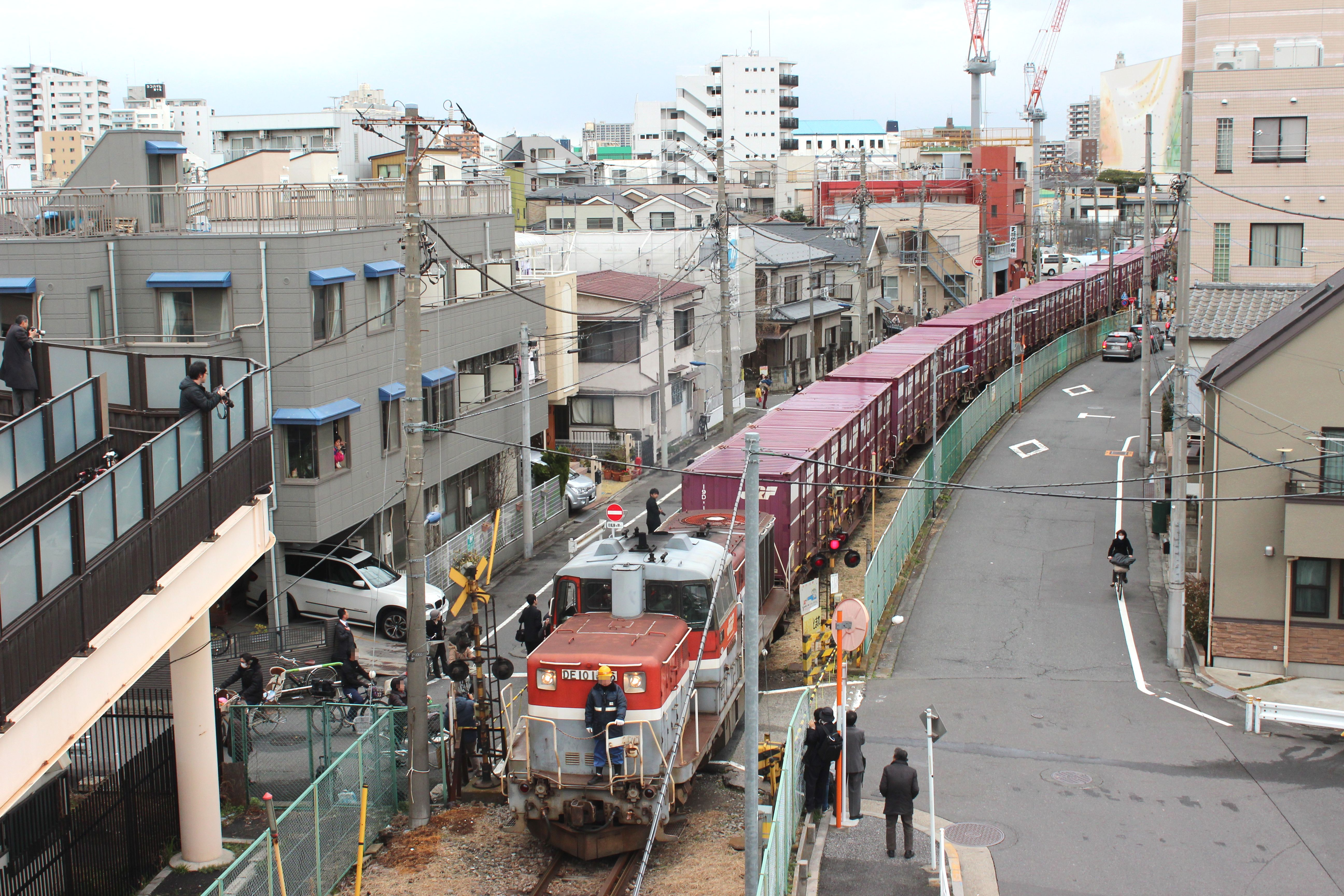 東北本線貨物支線（北王子線）を走るDE10形ディーゼル機関車